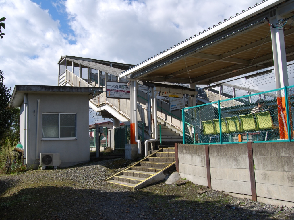 東武鉄道鬼怒川線大桑駅東口出入口（2008/10/28撮影）